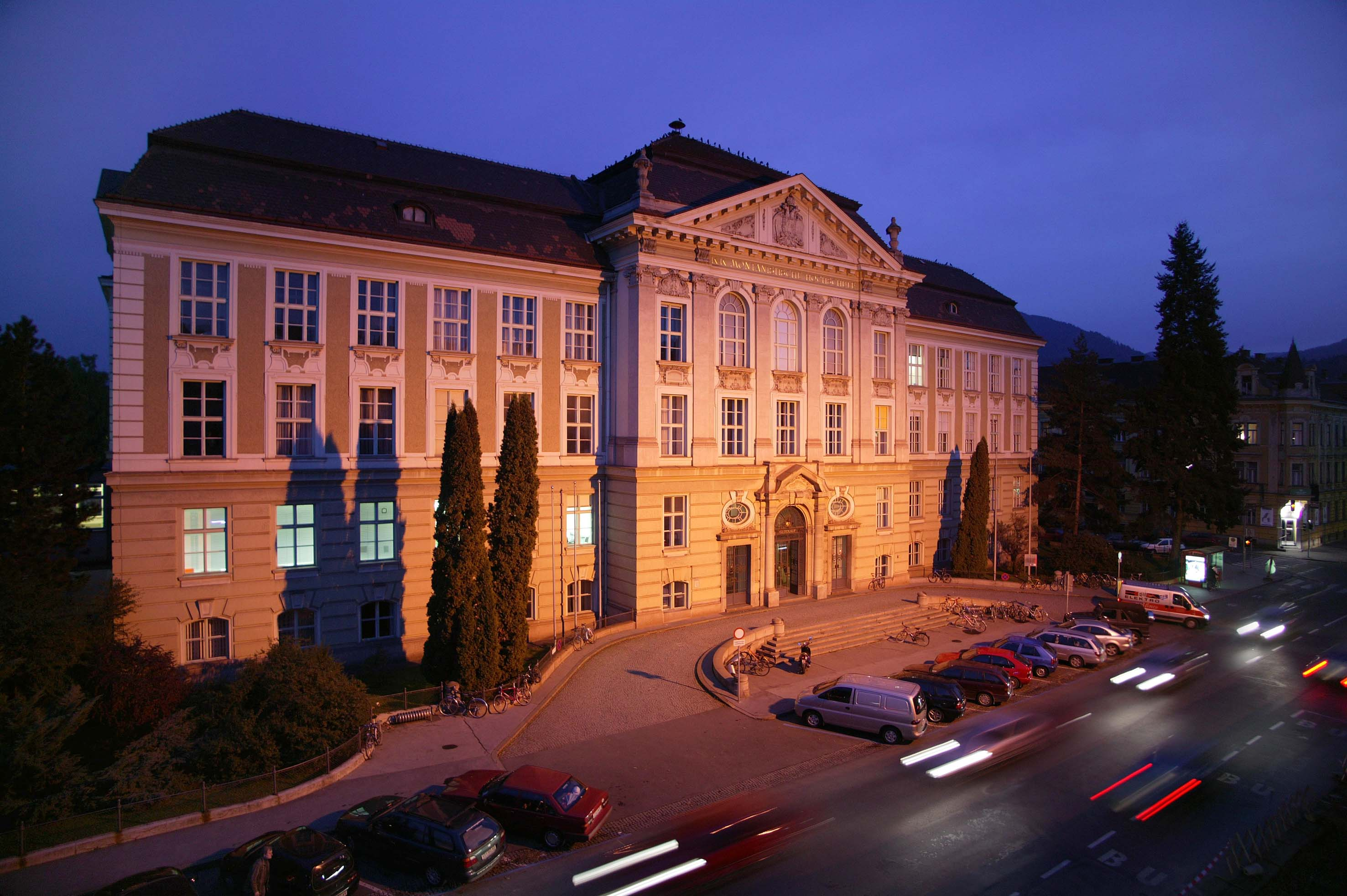 Die Montanuniversität Leoben bei Nacht.